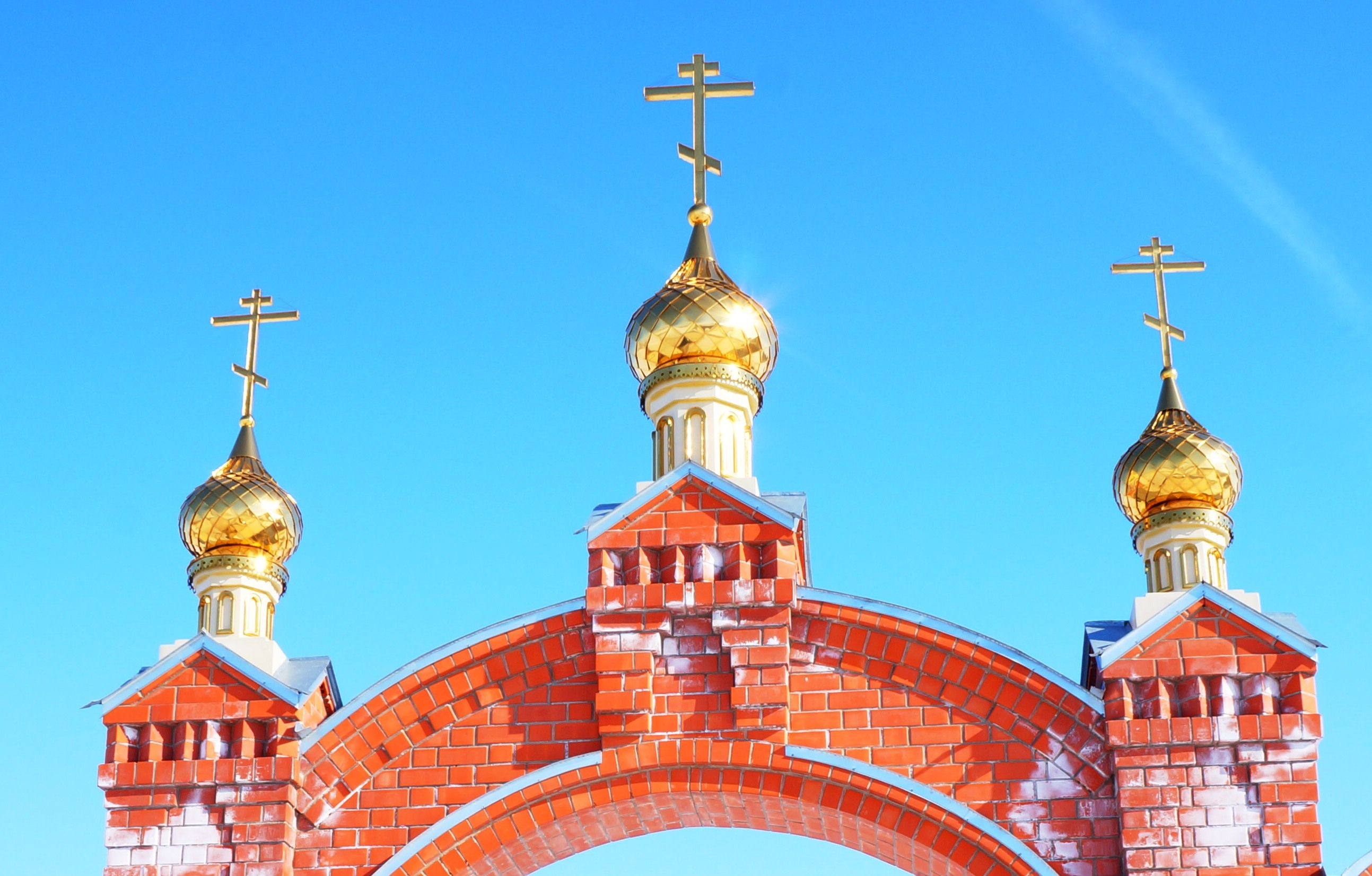 Свято-Никольский монастырь, Саратовская область, Россия